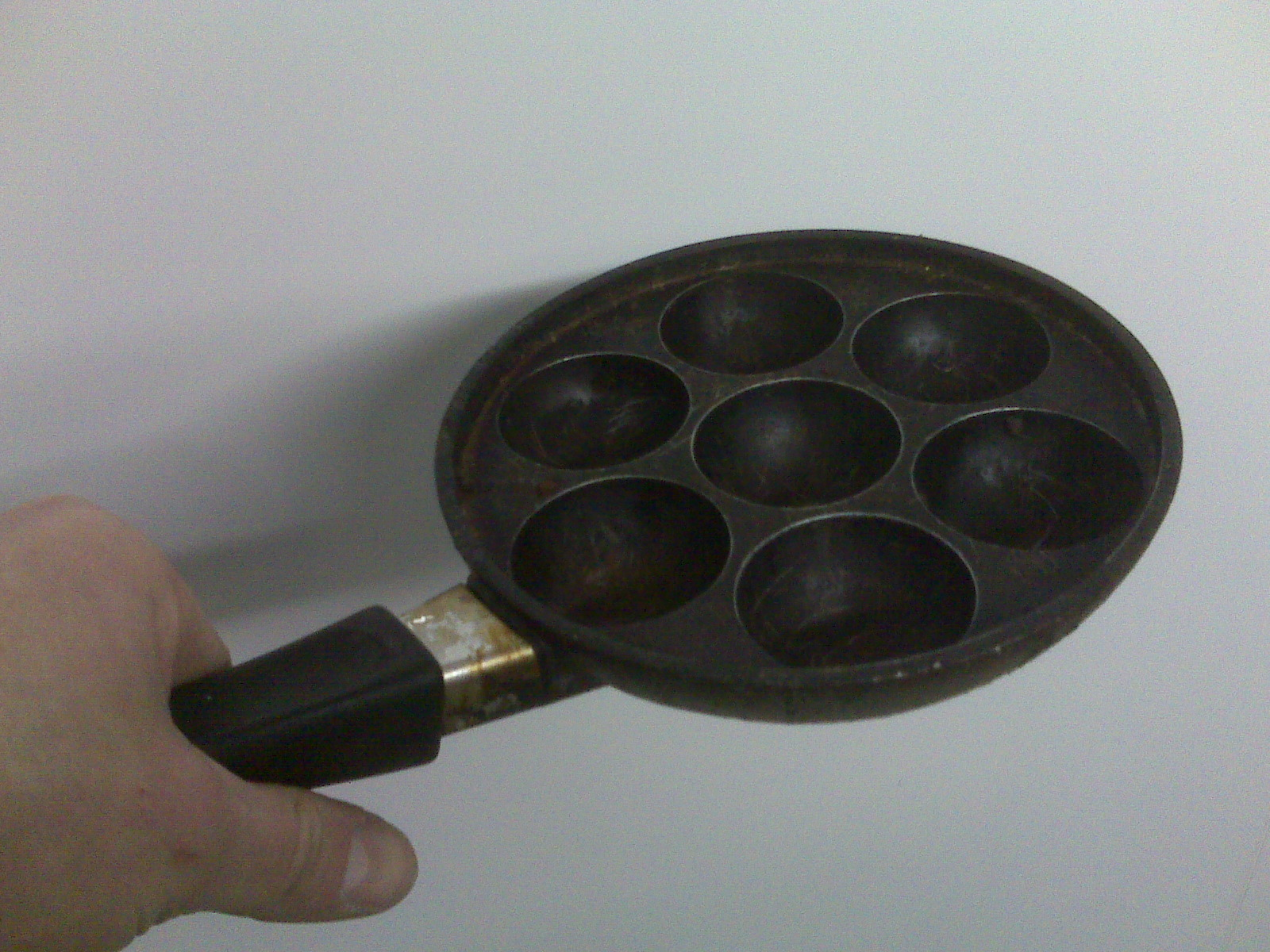 Moderne Pförtchenpfanne (Förtchenpfanne). Pförtchen/Förtchen sind ein traditionelles Gebäck in Teilen Norddeutschlands, insbesondere der schleswig-holsteiner und niedersächsischen Küche und in Dänemark, das besonders zur Weihnachtszeit und zu Silvester gebacken wird.